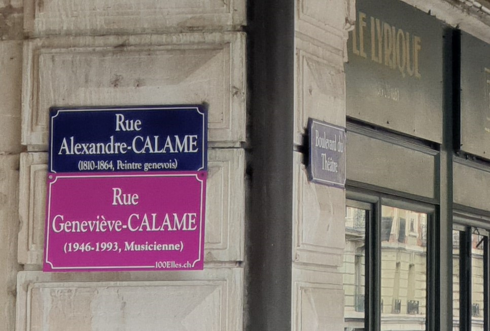 Plaque temporaire de rue apposée dans le cadre du projet 100elles à Genève en 2019